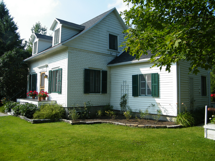 Maison du meunier du moulin Beaudet de Saint-Antoine-de-Tilly (Chaudière-Appalaches), au Québec. Moulin à eau, moulin à farine.